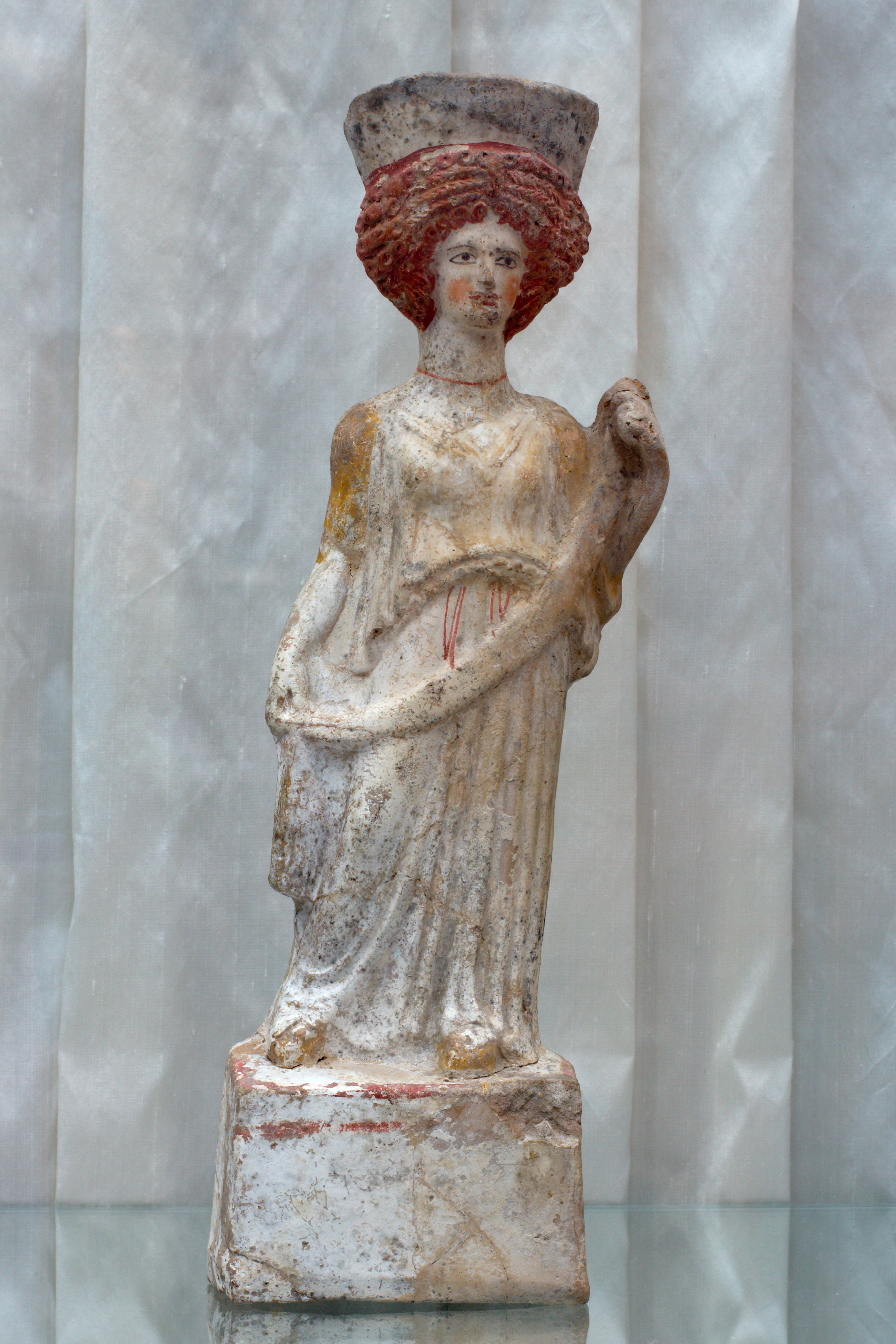 Junge Frau mit Stoffbinde (Böothien) .